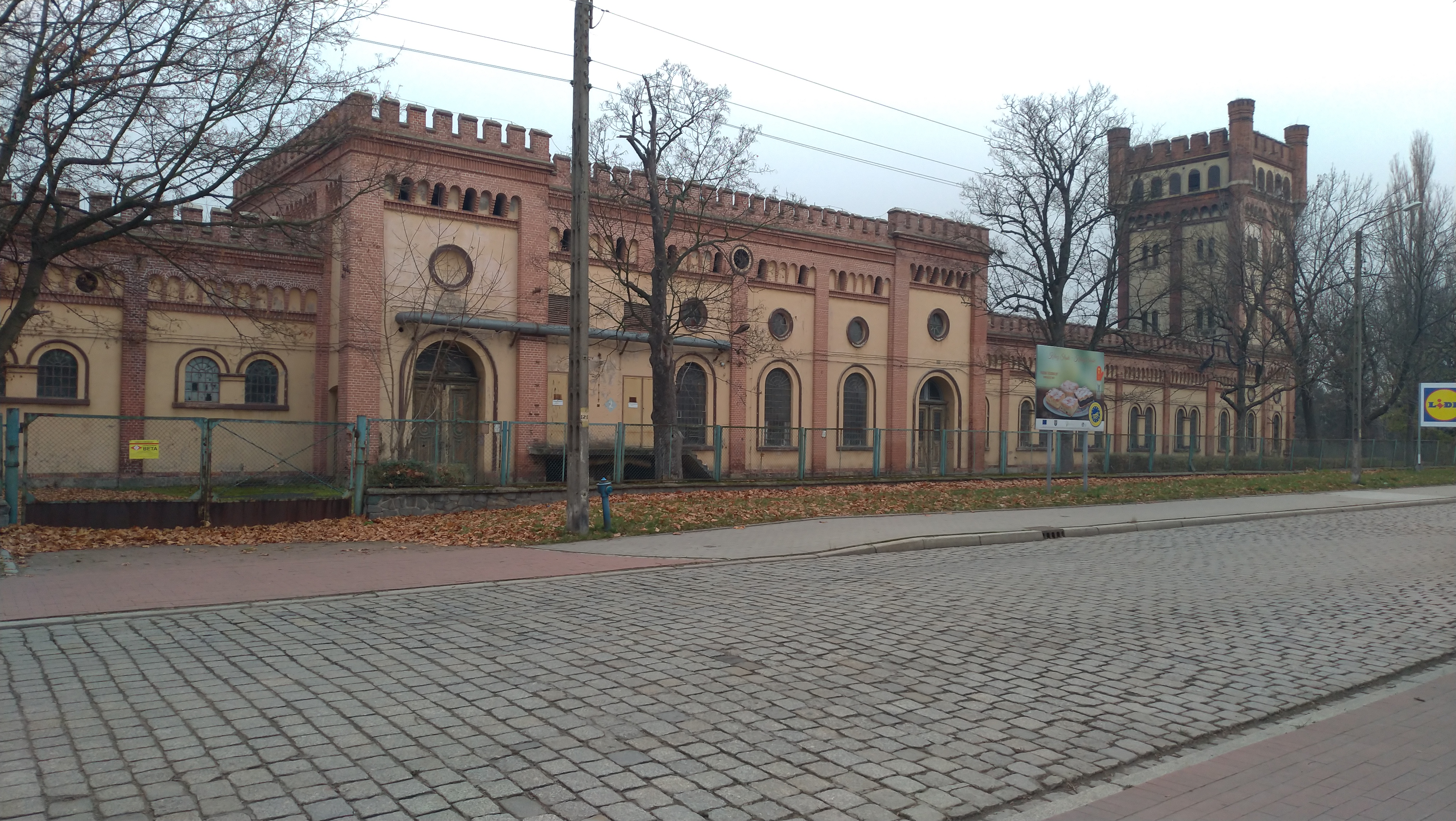 Wykończalnia ZPB "Frotex" w Prudniku.